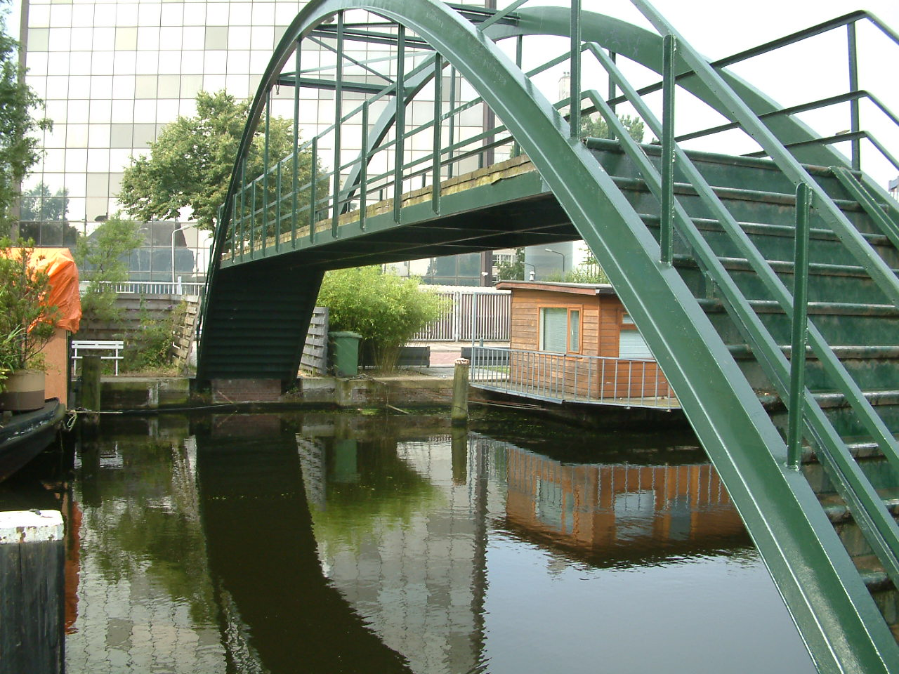 Brug in Den Haag